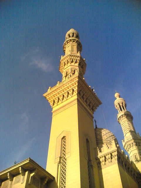 مسجد الفتح أكبر مساجد محافظة الشرقية